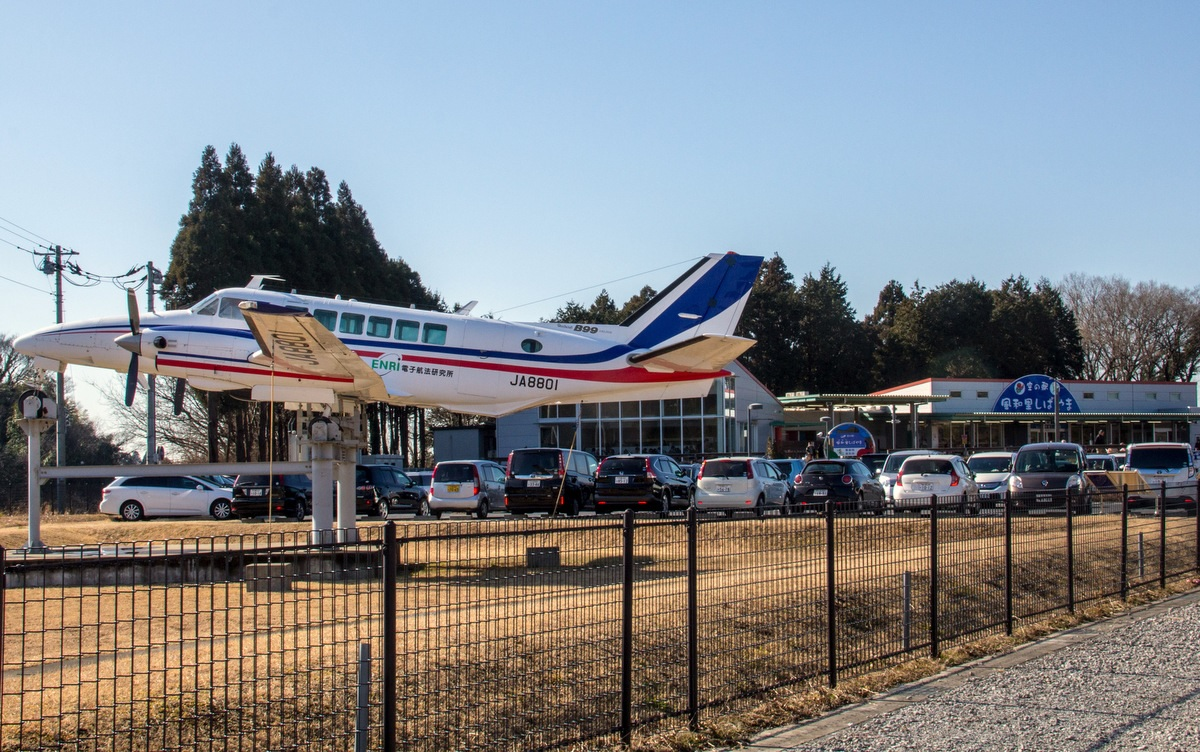 風和里しばやま